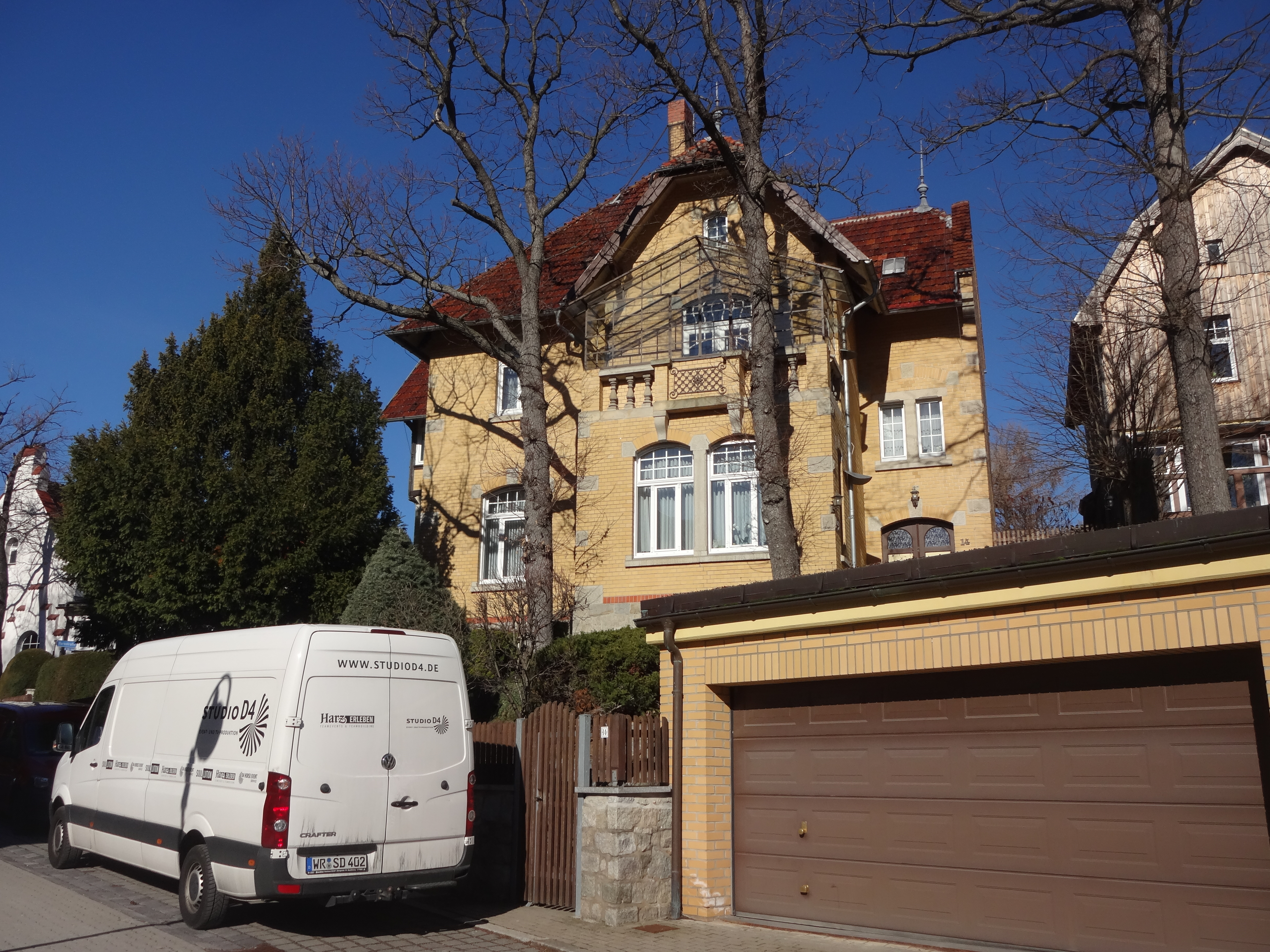 ehemals denkmalgeschützte Villa in der Hornstraße 14 in Wernigerode